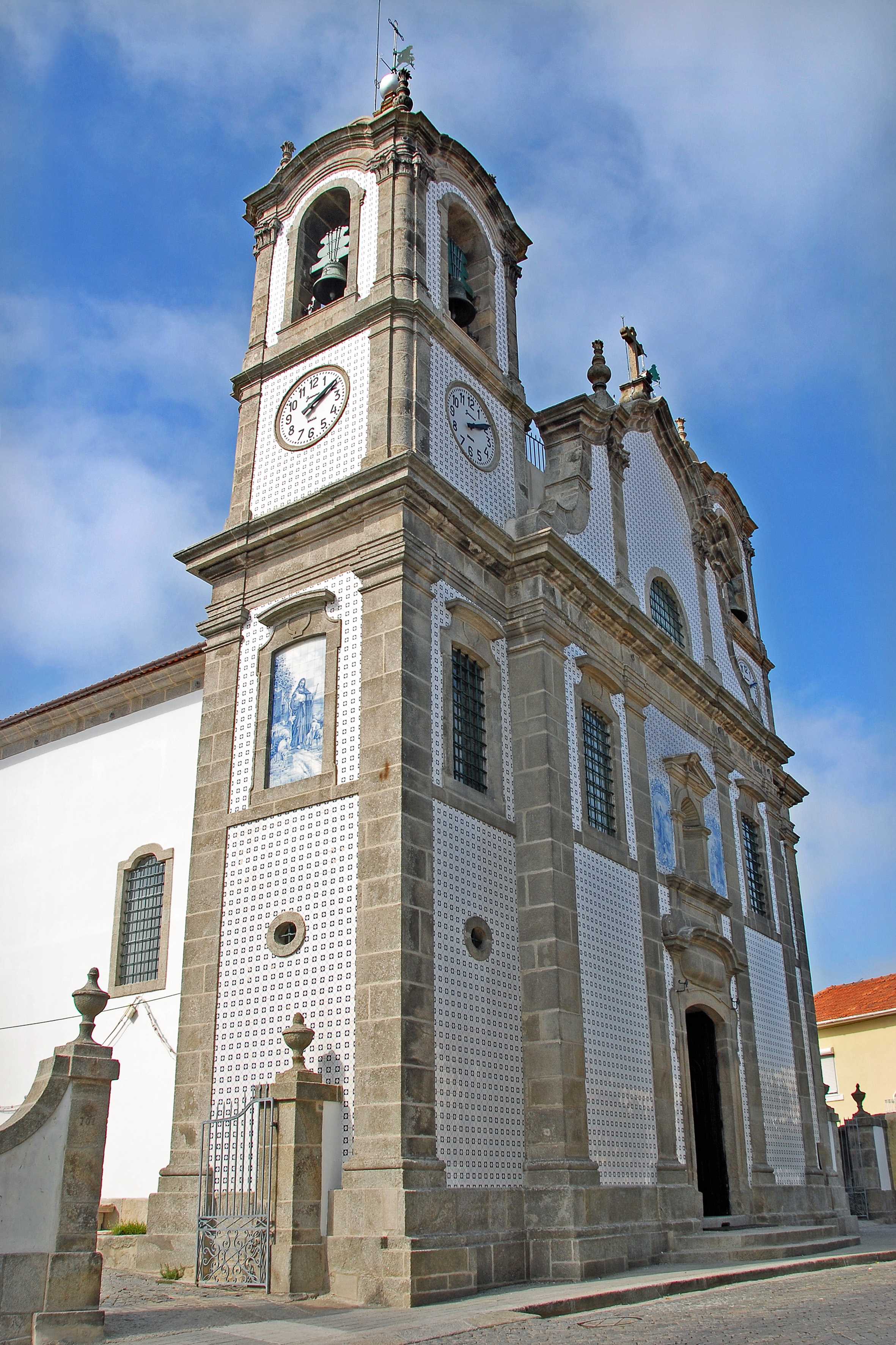 Igreja de S. Martinho de Lordelo ou Igreja de Lordelo This file was uploaded for Wiki Loves Monuments in Portugal with the unique identifier 73478.